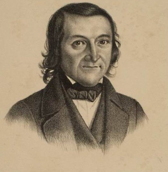 Johann Christian Felix Bähr (1798–1872), Professor der Eloquenz und Oberbibliothekar an der Universität Heidelberg. Lithographie nach einer Zeichnung